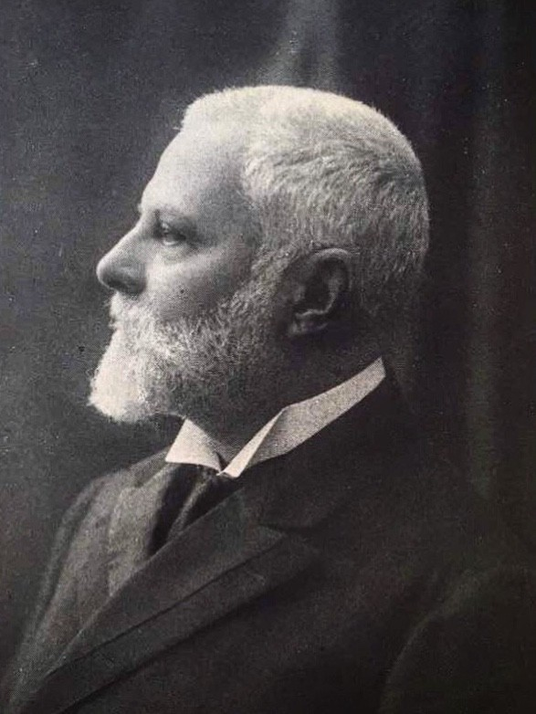 El jurista y político venezolano Guillermo Tell Villegas Pulido.